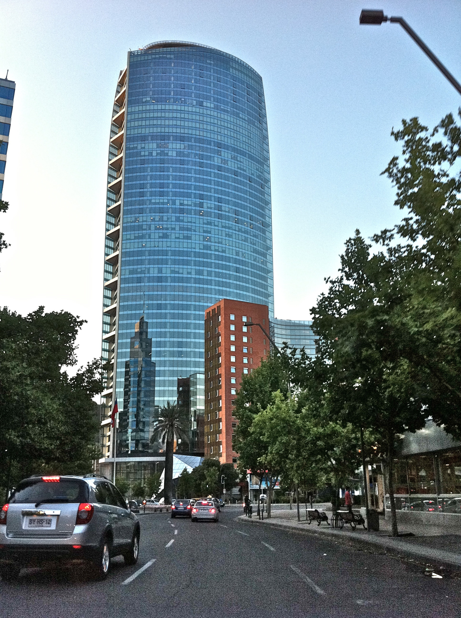 Titanium La Portada